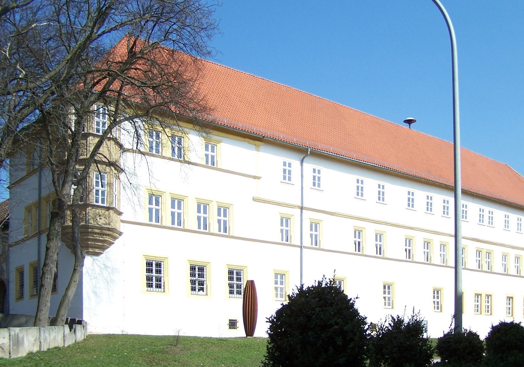 Ansichten und Details zum Ort Behringen im Wartburgkreis.